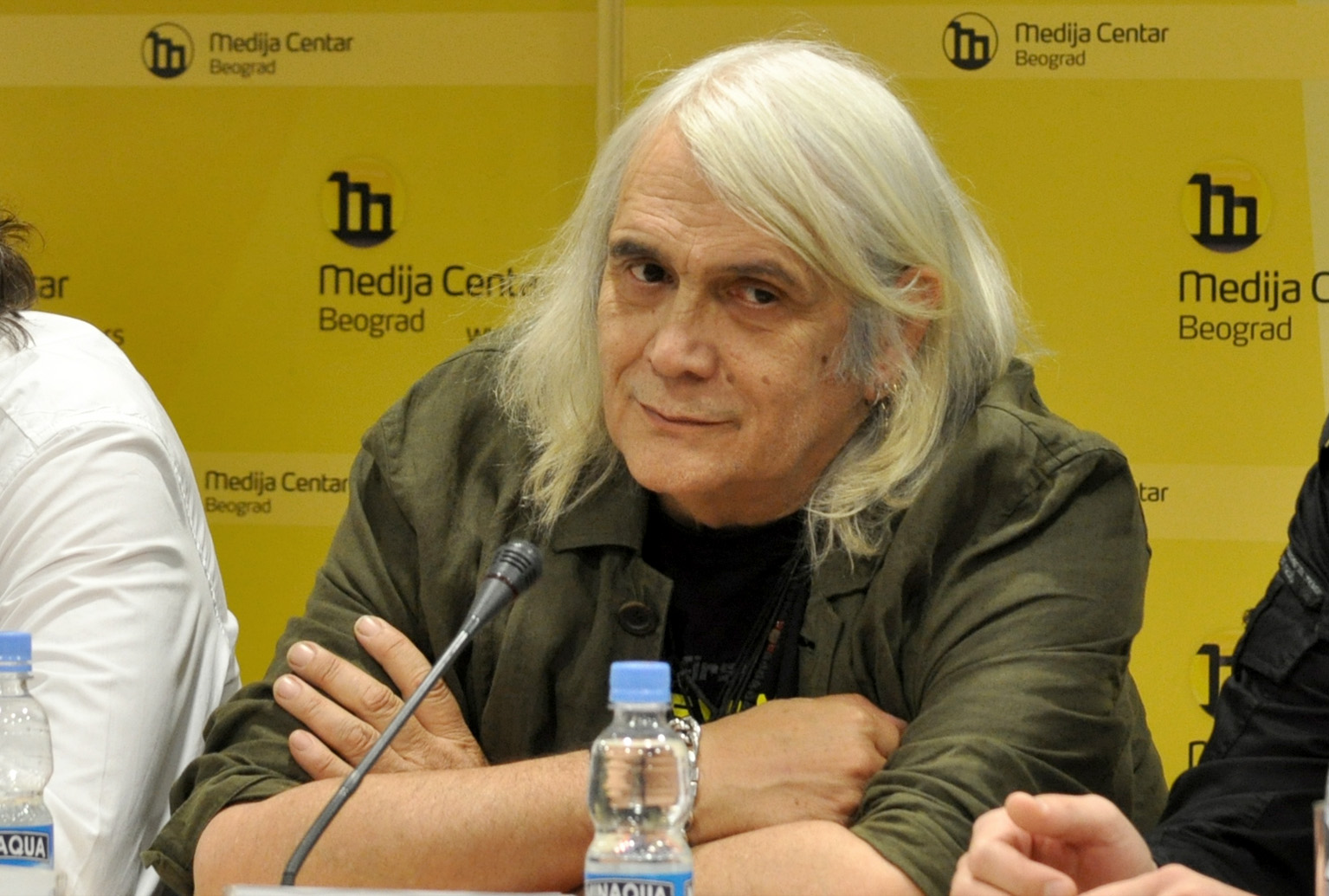 Бора Ђорђевић српски рок музичар